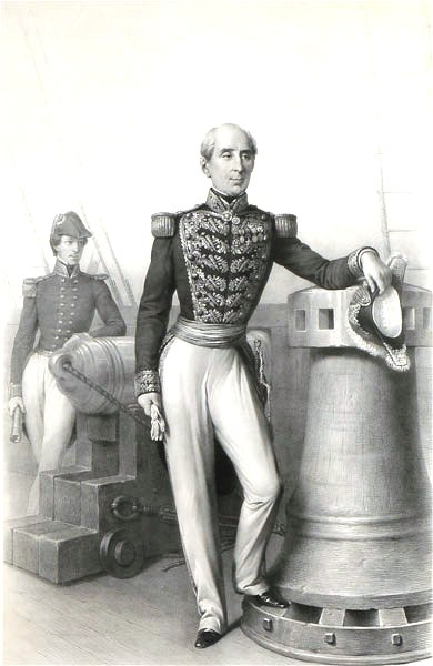 León Noel Lemercier. Retrato del Almirante Manuel Blanco Encalada. Paris, 1856. Litografía. 94x 65 cm. Colección de Pintura y Estampas.